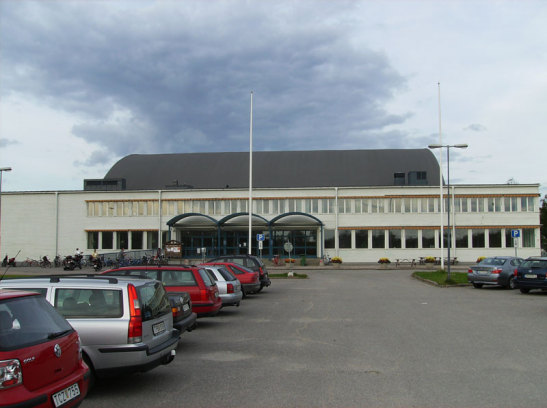 Jernvallen in Sandviken, Sweden.